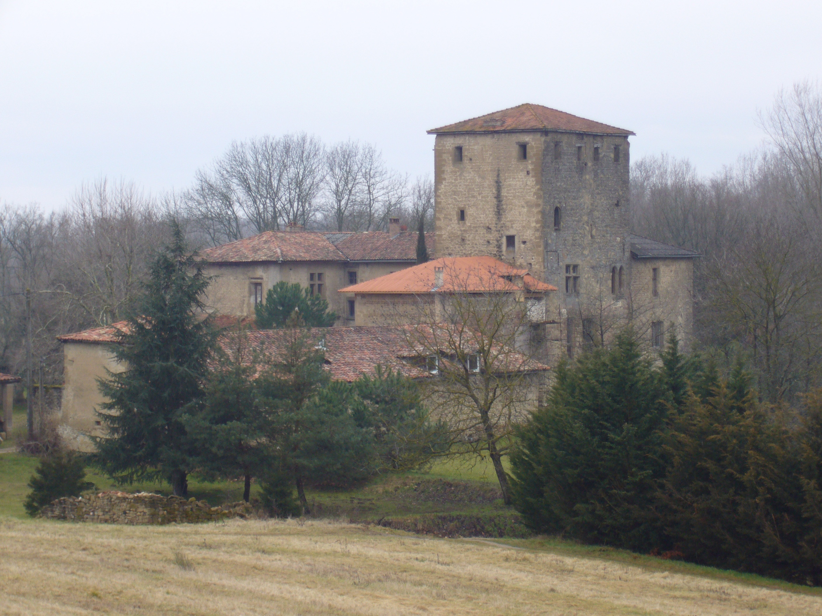 Saint Bonnet de Chavagne (Isère) Vue d'ensemble de la Maison-Forte du Chatelard Photo prise par DE